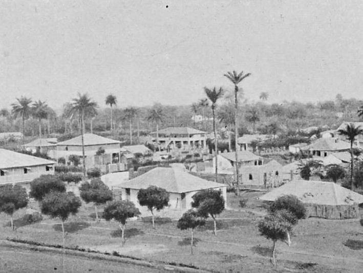 Konakry: Vue générale